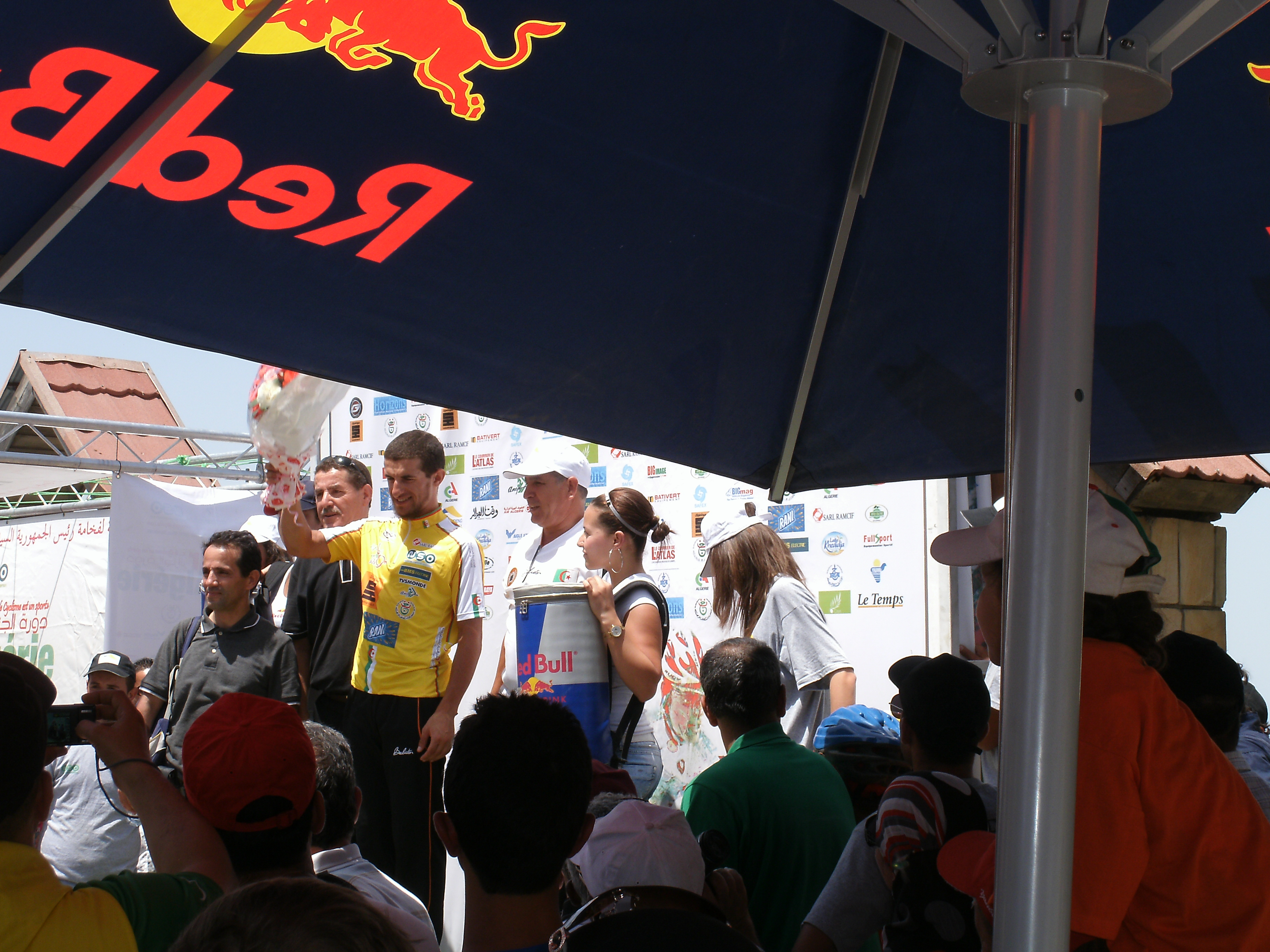 Vainqueur du Tour d'Algérie 2011